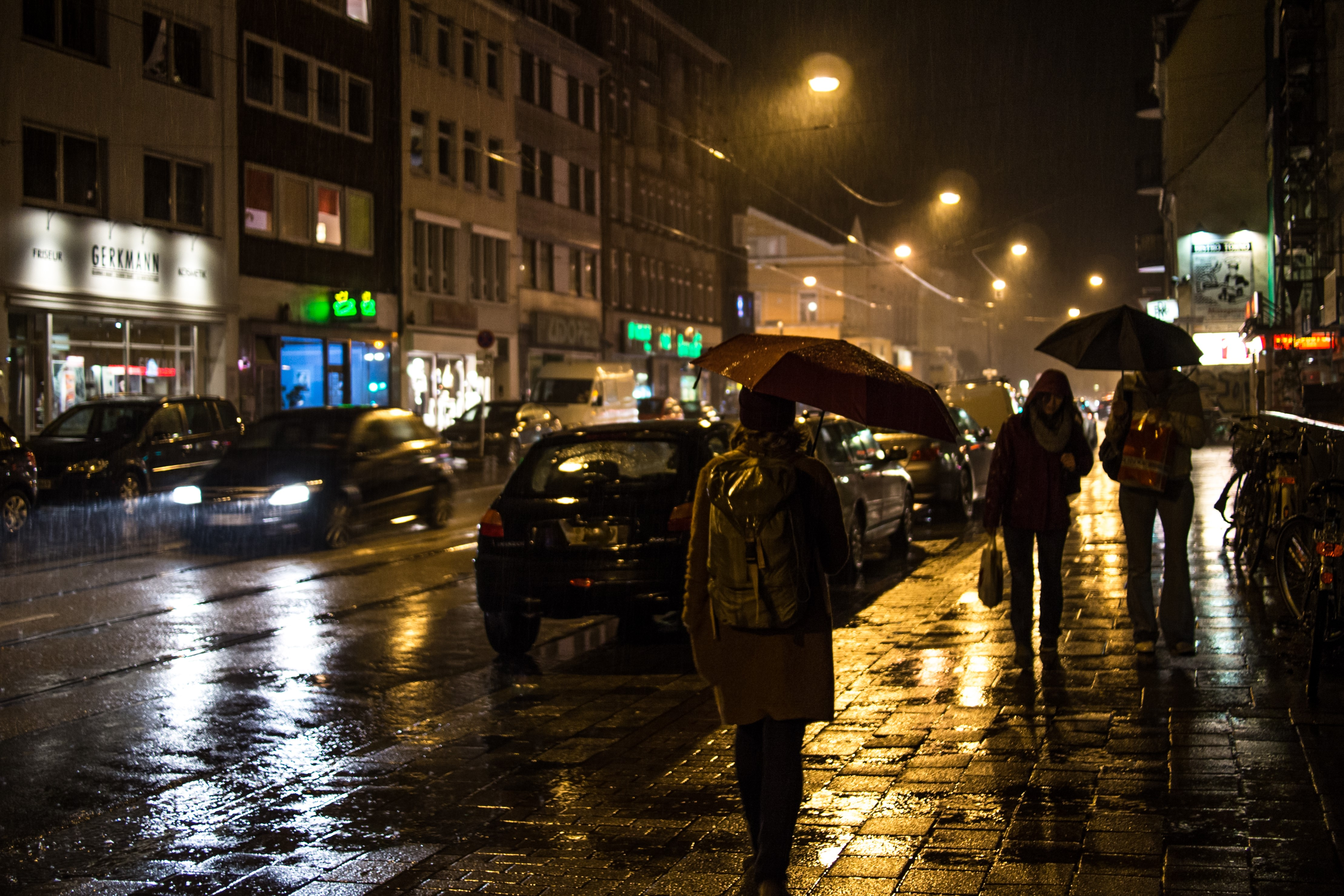 Nachtszene im "Viertel" in Bremen, Blick von der Straße Am Dobben in Richtung Sielwallkreuzung (links: Vor dem Steintor, geradeaus: Sielwall, rechts: Ostertorsteinweg).